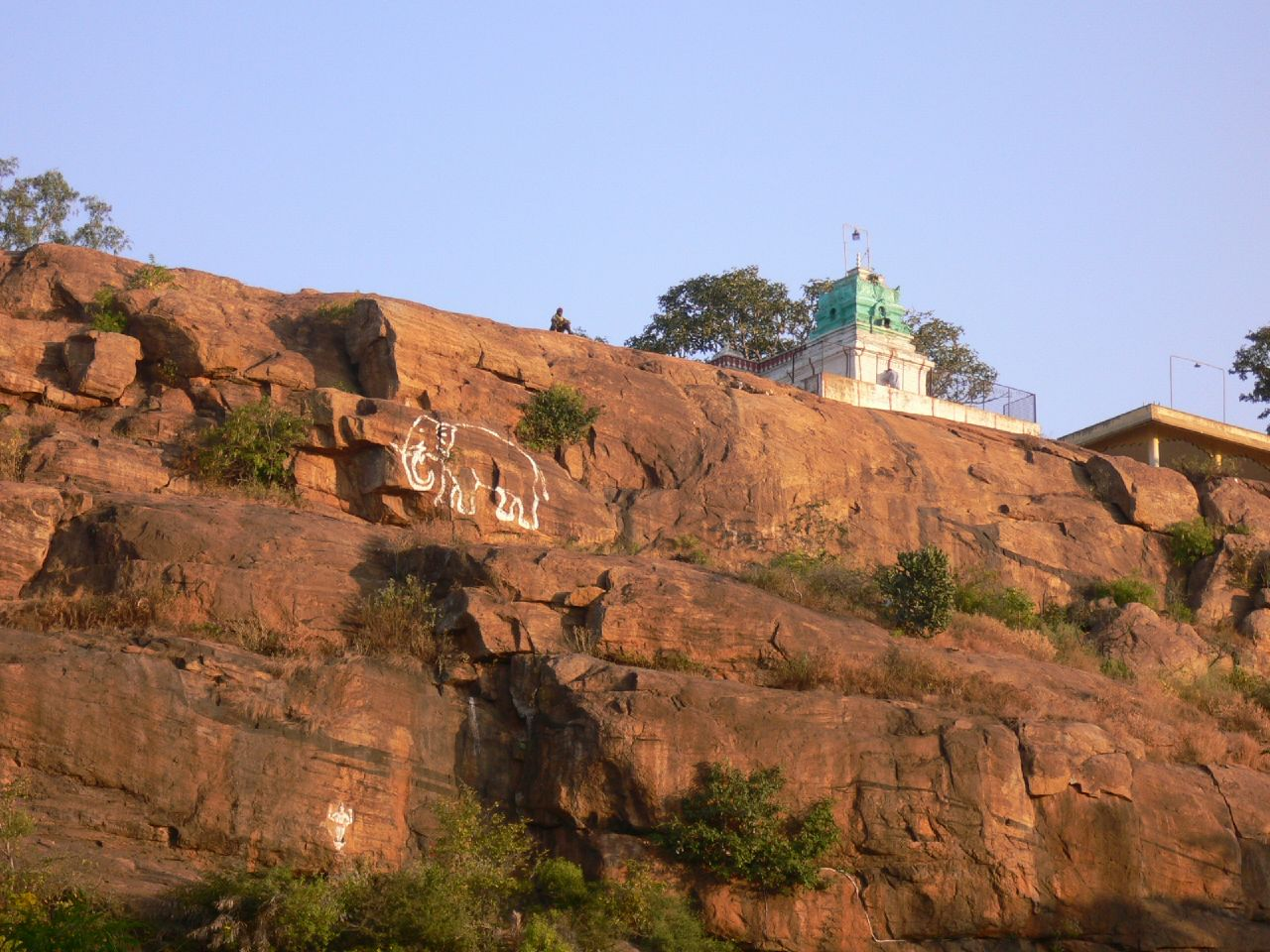 Kolegal, Chamrajnagar, Karnataka in India